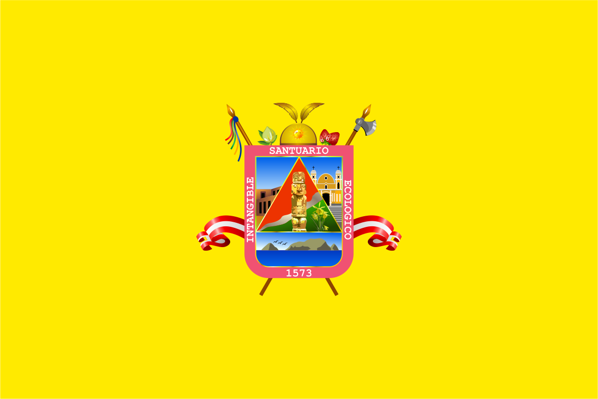 Bandera del Distrito de Pachacámac - Provincia de Lima - Región Lima